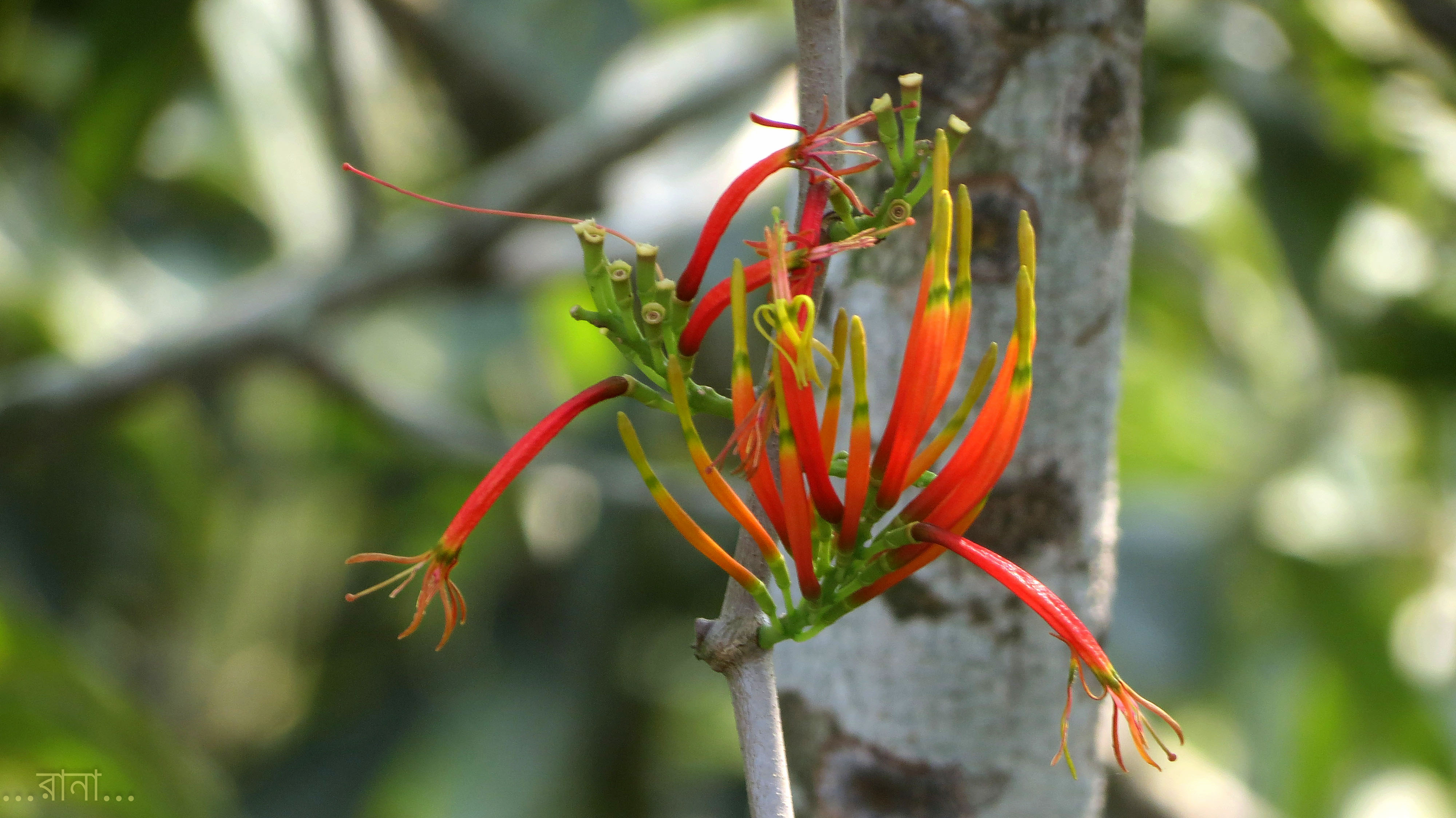 এটি মেহগিনি গাছে হয়েছিল।